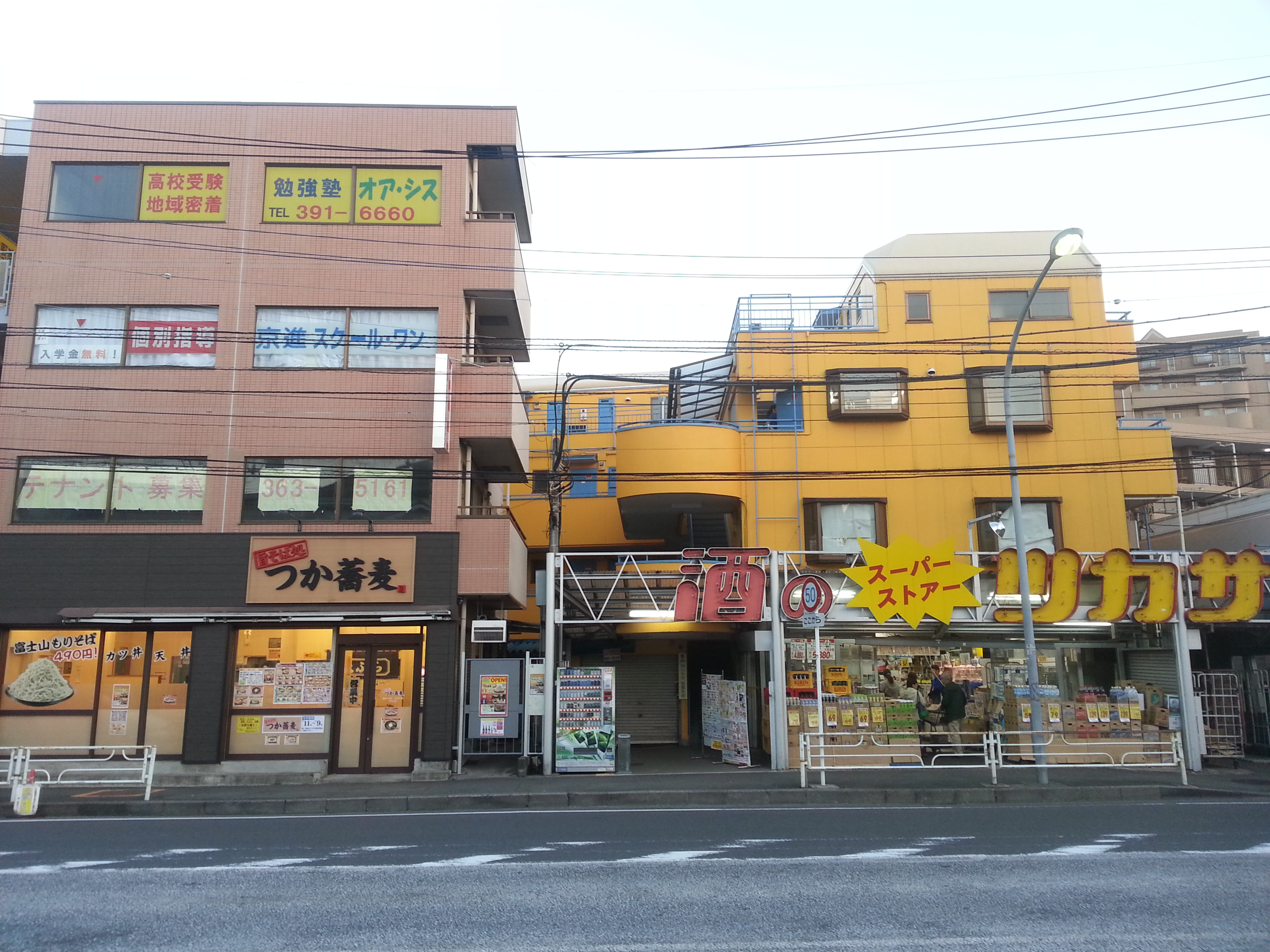 酒のツカサ二俣川本店とつか蕎麦。